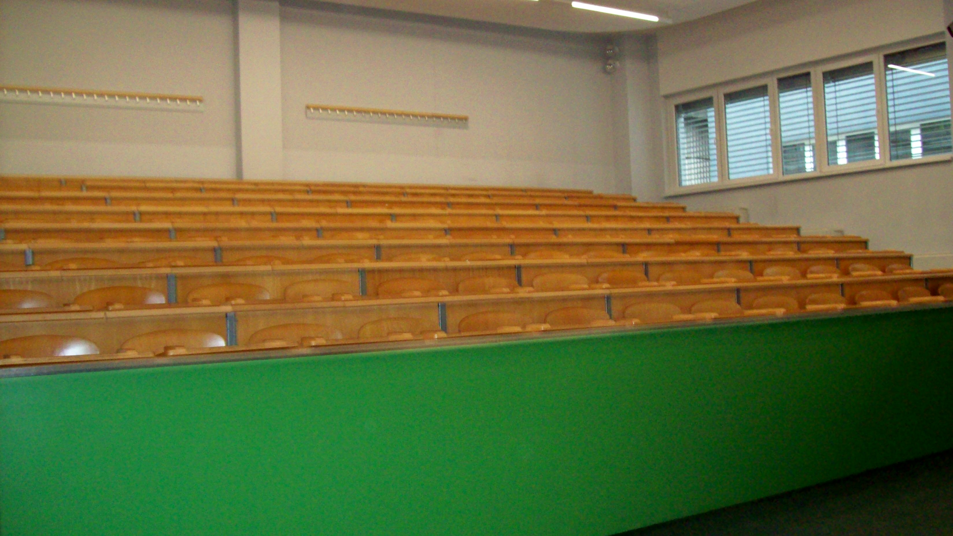 Syllabova posluchárna, budova 3. lékařské fakulty Univerzity Karlovy v Praze, ulice Ruská 87, Praha 10.